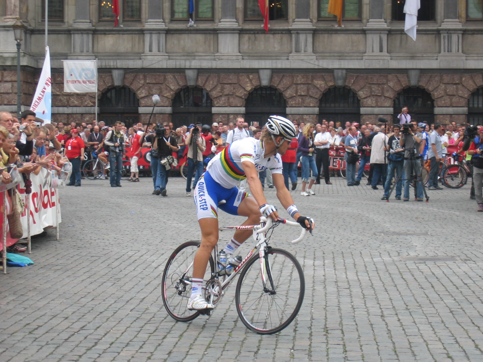 West-Vlams: Tom Boonen, Grote Markt Antwerpen, Belgisch Kampioenschap, 25/06/2006